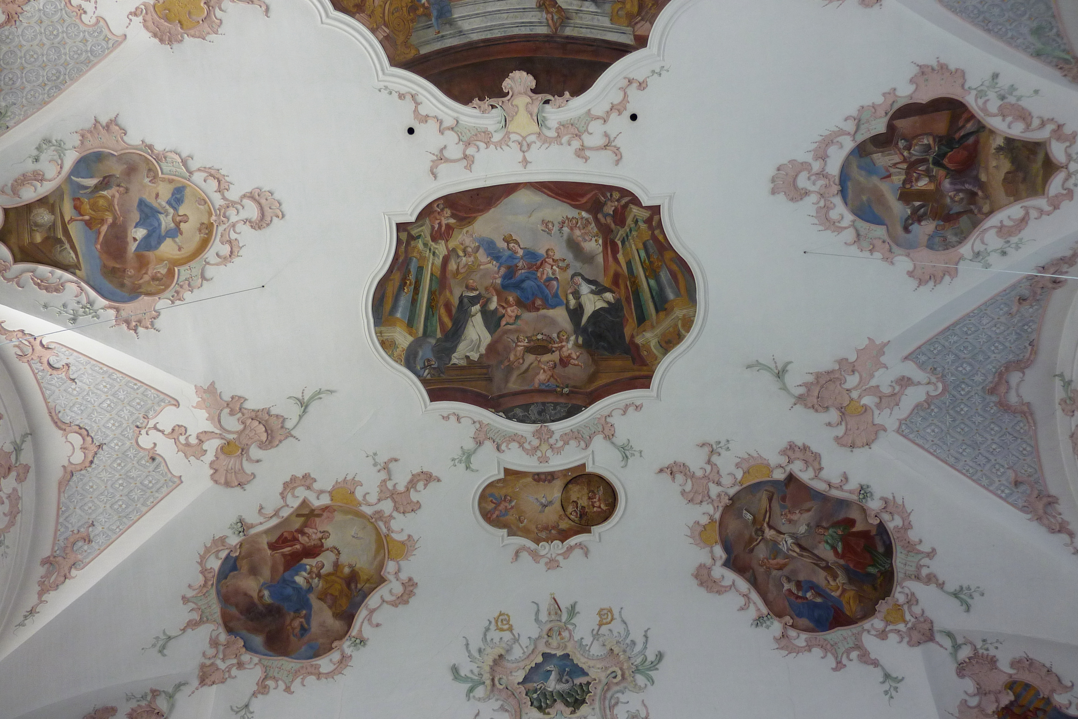 Katholische Pfarrkirche St. Peter in Tapfheim im Landkreis Donau-Ries (Bayern), Deckenfresko um 1750, von Anton Enderle (1700-1761)